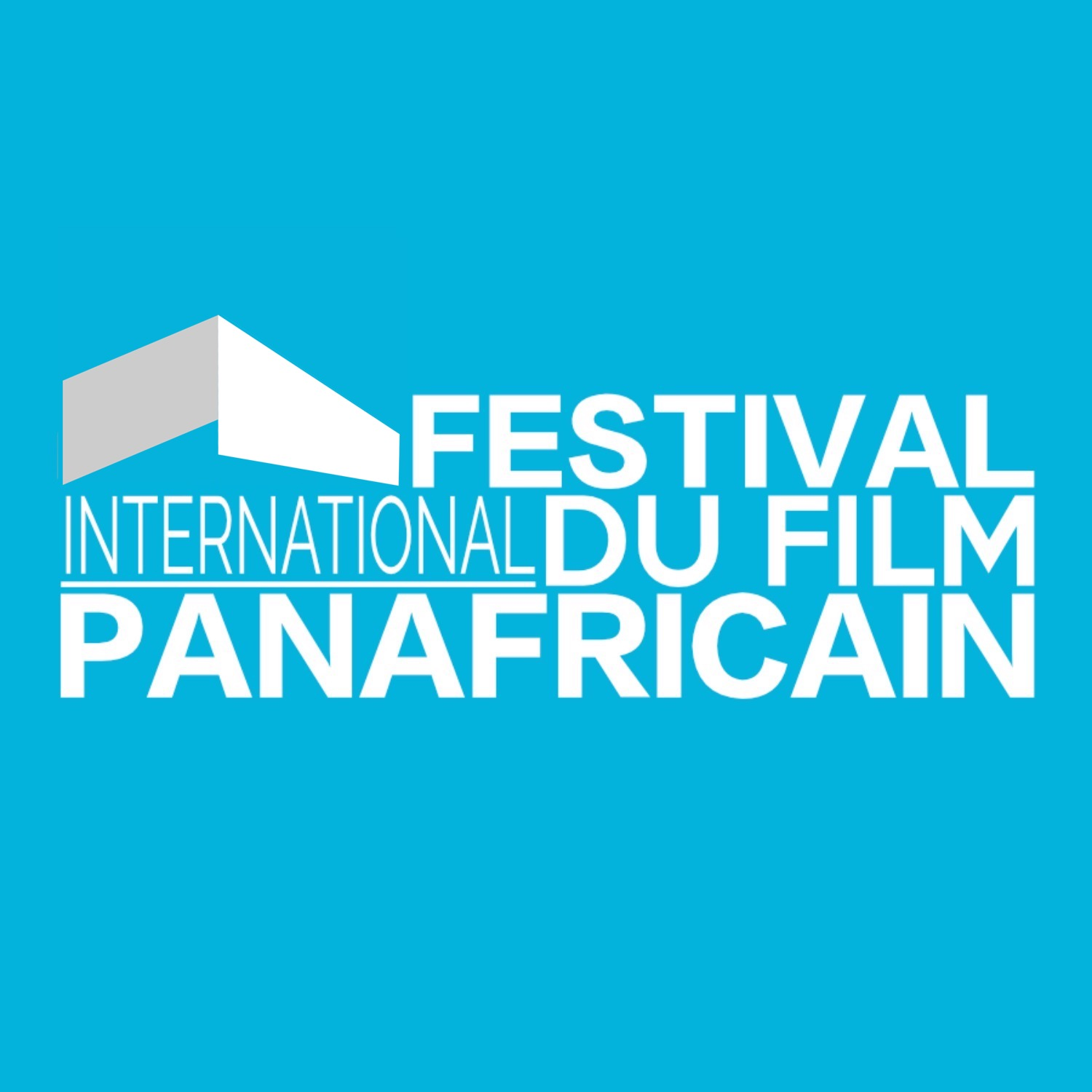 Logo du Festival du Films Panafricain de Cannes